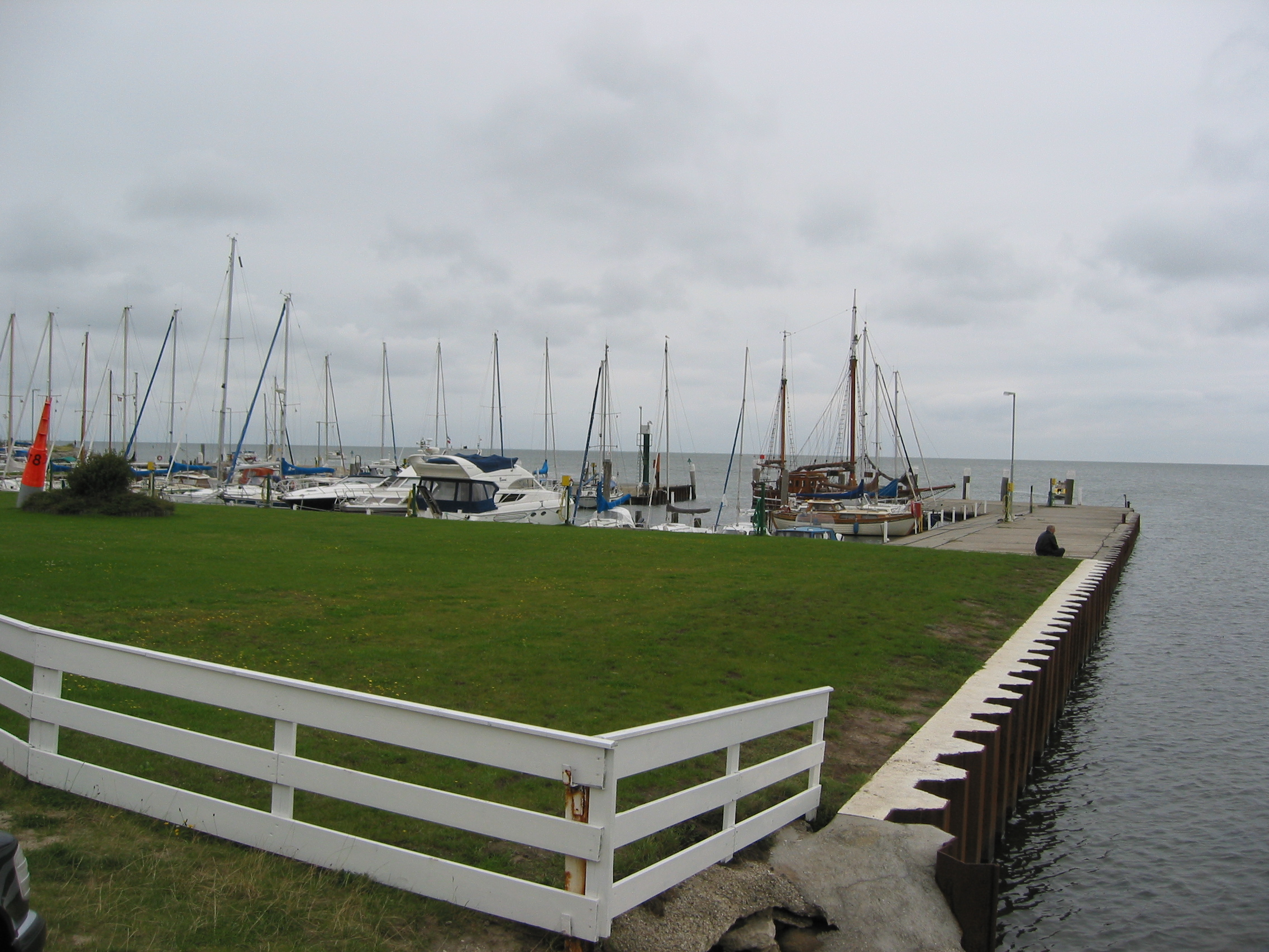 Munkmarsch yacht harbour